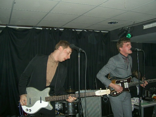 Peter Nilsson och Anders Pietsch under en spelning på Klubb Utopi i Skövde .